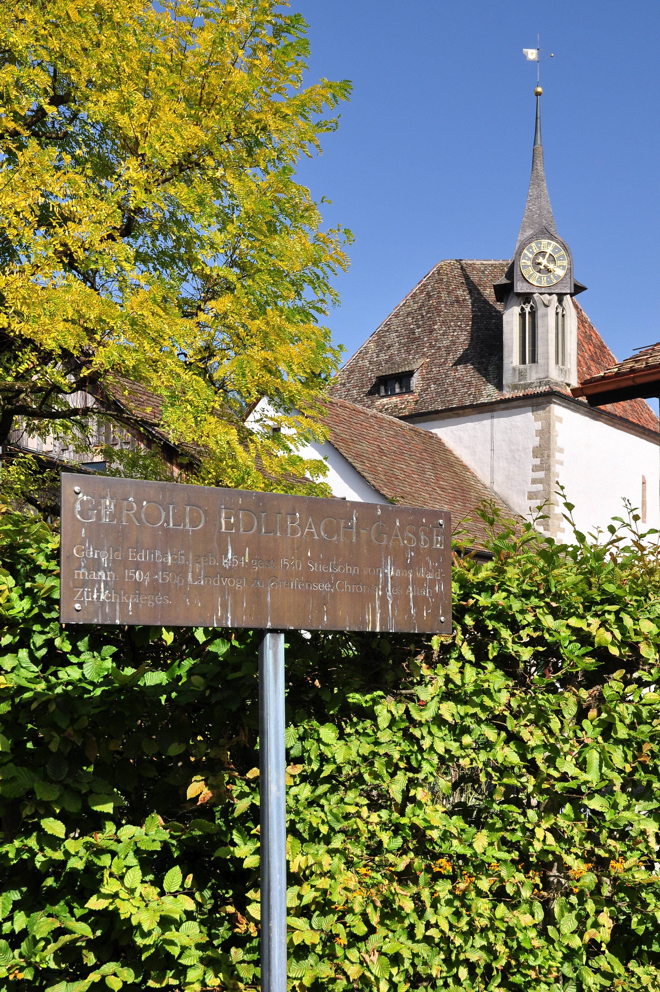 Gallus-Kapelle in Greifensee (Switzerland)